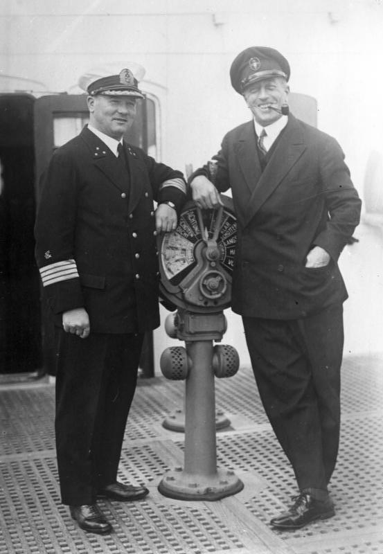 Graf Luckner, der Führer des bekannten Seeteufels, wieder in Deutschland ! Graf Luckner mit dem Führer der "Bremen" Kapitän Ziegenbein bei seiner Ankunft in Bremen.